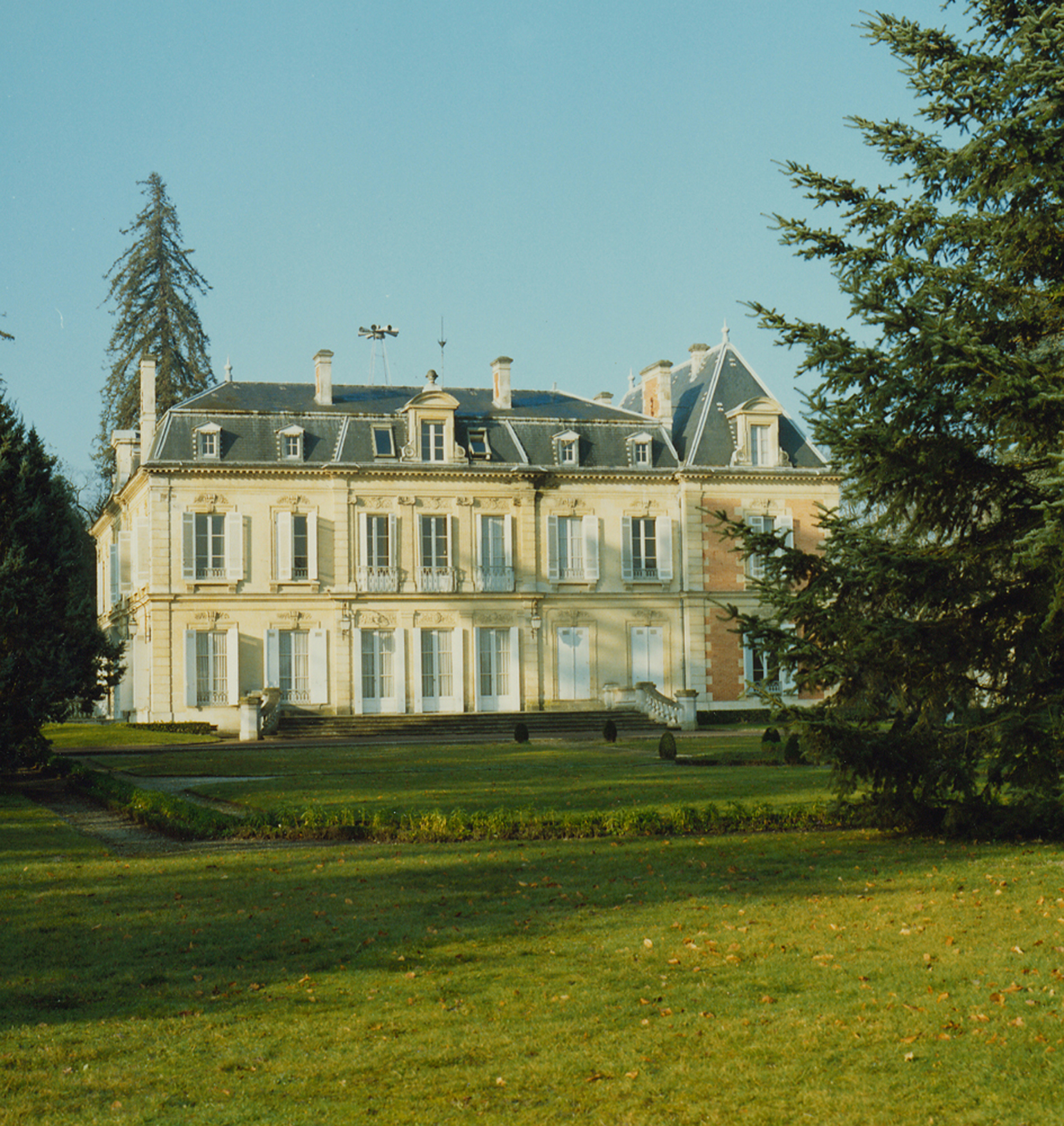 Vestiges de l'ancien hospice devenu prieuré de Cayac, établi sur la route du pèlerinage de Saint-Jacques-de-Compostelle et mentionné dès 1234 ; il dépendait de l'abbaye Sainte-Croix de Bordeaux et a été inscrit monument historique en 1937 et 1978.